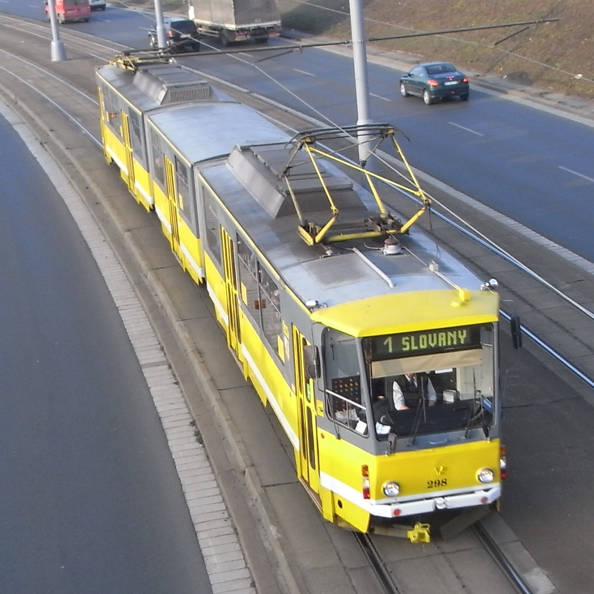 Tramvaj KT8D5 v Plzni.